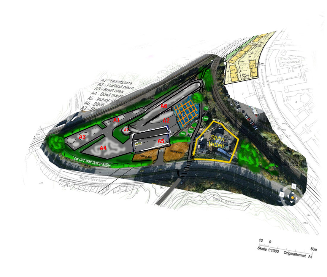 Illustration skiss på Highvalley Skateworld